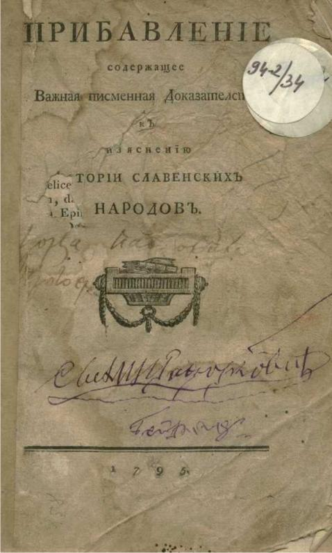 Насловна страна збирке историјских извора Прибавленије III која се налази у библиотеци Историјског архива Јагодине, Беч 1795.